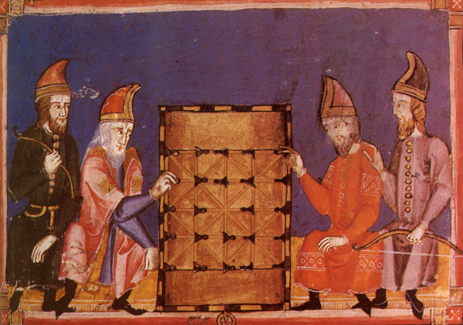 Men playing Alquerque, pictured in Libro de los juegos.